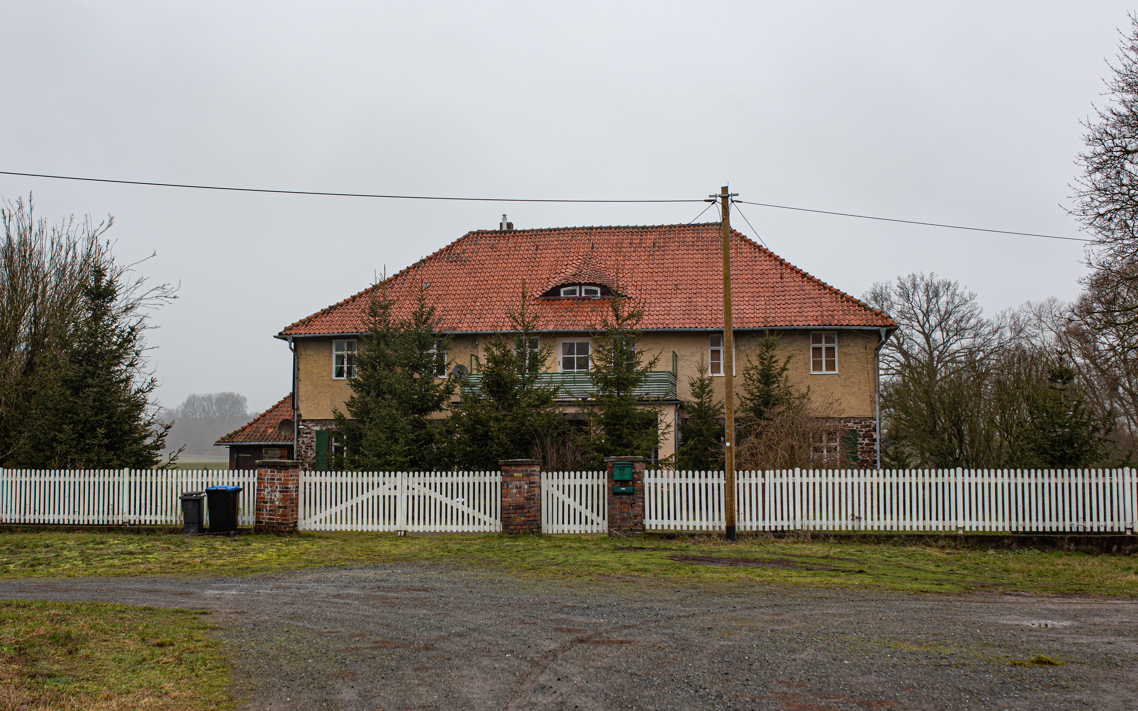 Das Neue Haus bei Cleysingen (Stadt Ellrich).